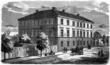 Skolan för sinnesslöa barn, Norrtullsgatan. Skolan fick utseendet på bilden efter en tillbyggnad ritad av Axel och Hjalmar Kumlien 1875